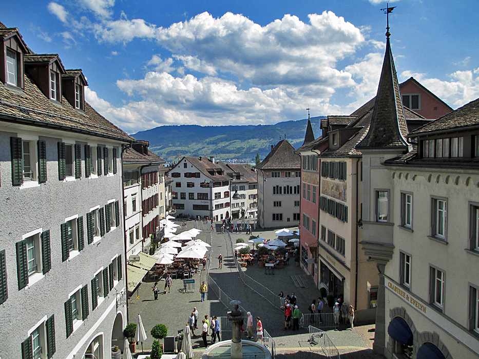 Rapperswil, Hauptplatz